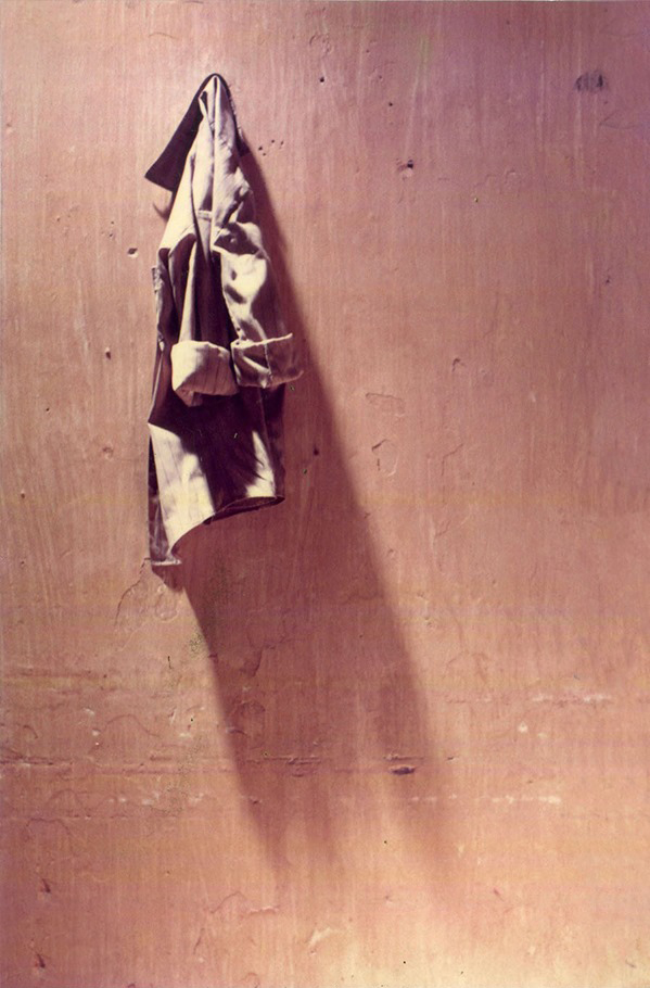 සිංහල: ඉන්ද්‍රනාථ තේනුවර ; මල්ලියෙ කොහේ කොතැනක නුඔ 1992 ; කැමරාව - පෙන්ටැක්ස් කේ 1000